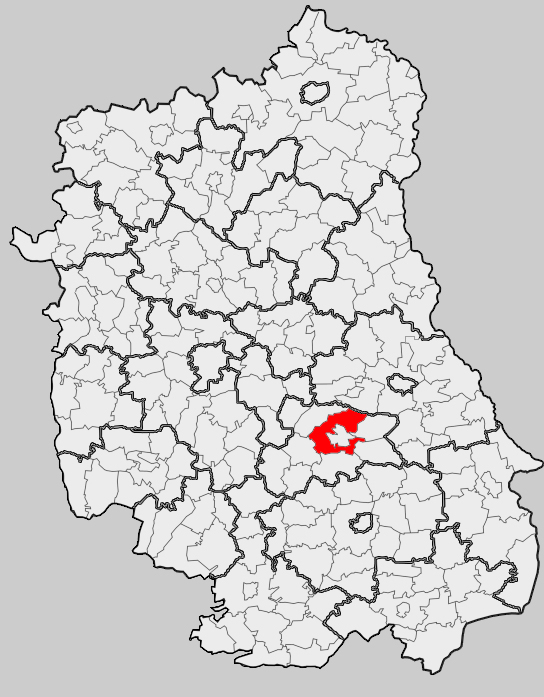 Map of gmina Krasnystaw (rural), Krasnystaw county, Lublin voivodship Mapa gminy Krasnystaw (wiejska), powiat krasnostawski, województwo lubelskie